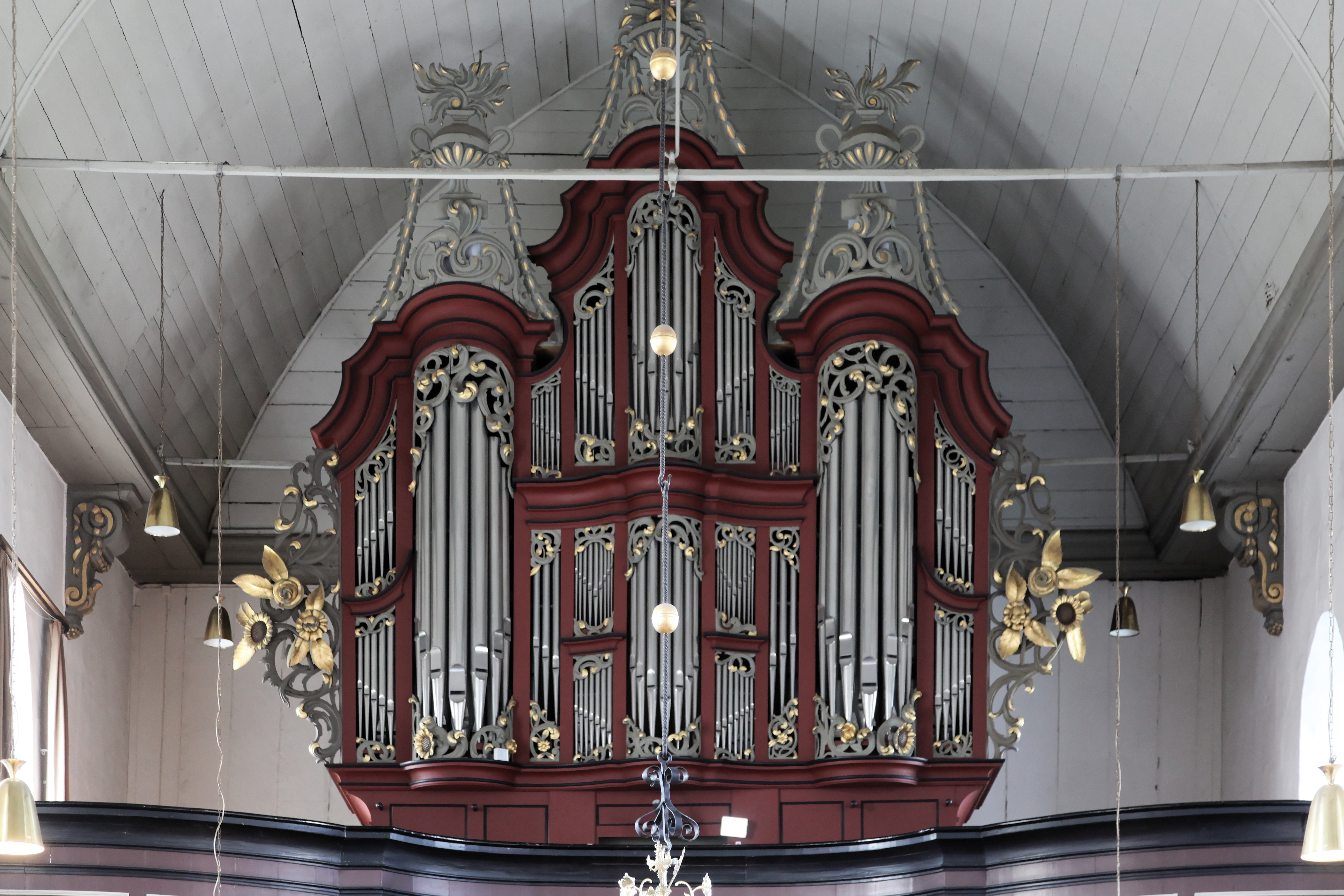 Martinskirche, Kirchring, am Tag des offenen Denkmals in Bunde (Germany)